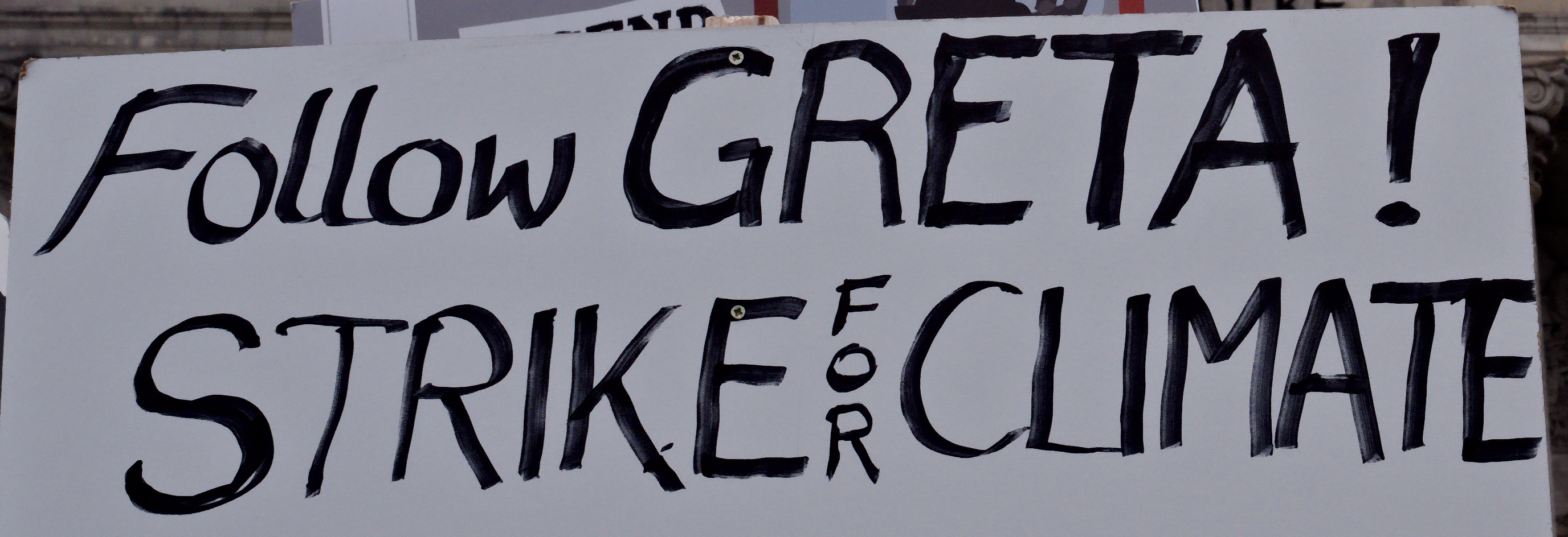 Unter dem Motto "#FridaysForFuture" und "Climate Strike!" streikten insbesondere Schülerinnen und Schüler vor dem Reichstagsgebäude in Berlin.